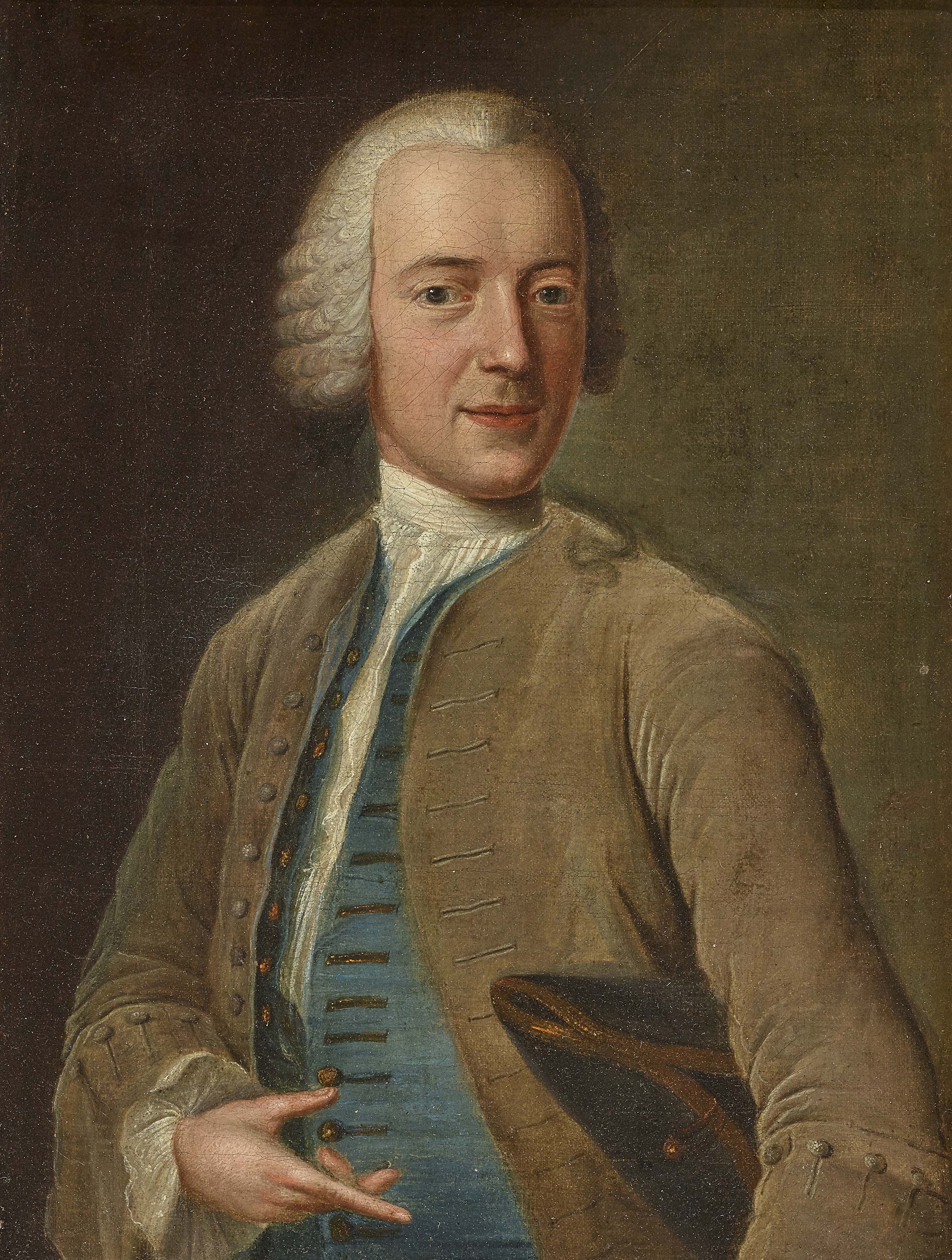 Das möglicherweise einzige Selbstbildnis des Malers „Johann Georg Ziesenis d. J.“ im reifen Mannesalter. Im Herrenporträt zeigt sich der Kunstmaler in einer Halbfigur nach links, den Kopf nach rechts gewandt, sowie „in der Kleidung der Mitglieder der Herrnhuter Gemeinde (Herrnhuter Brüder-Unität)“. Das Gemälde, Öl auf Leinwand in den Maßen 32 x 24 cm ist doubliert und wurde restauriert ...